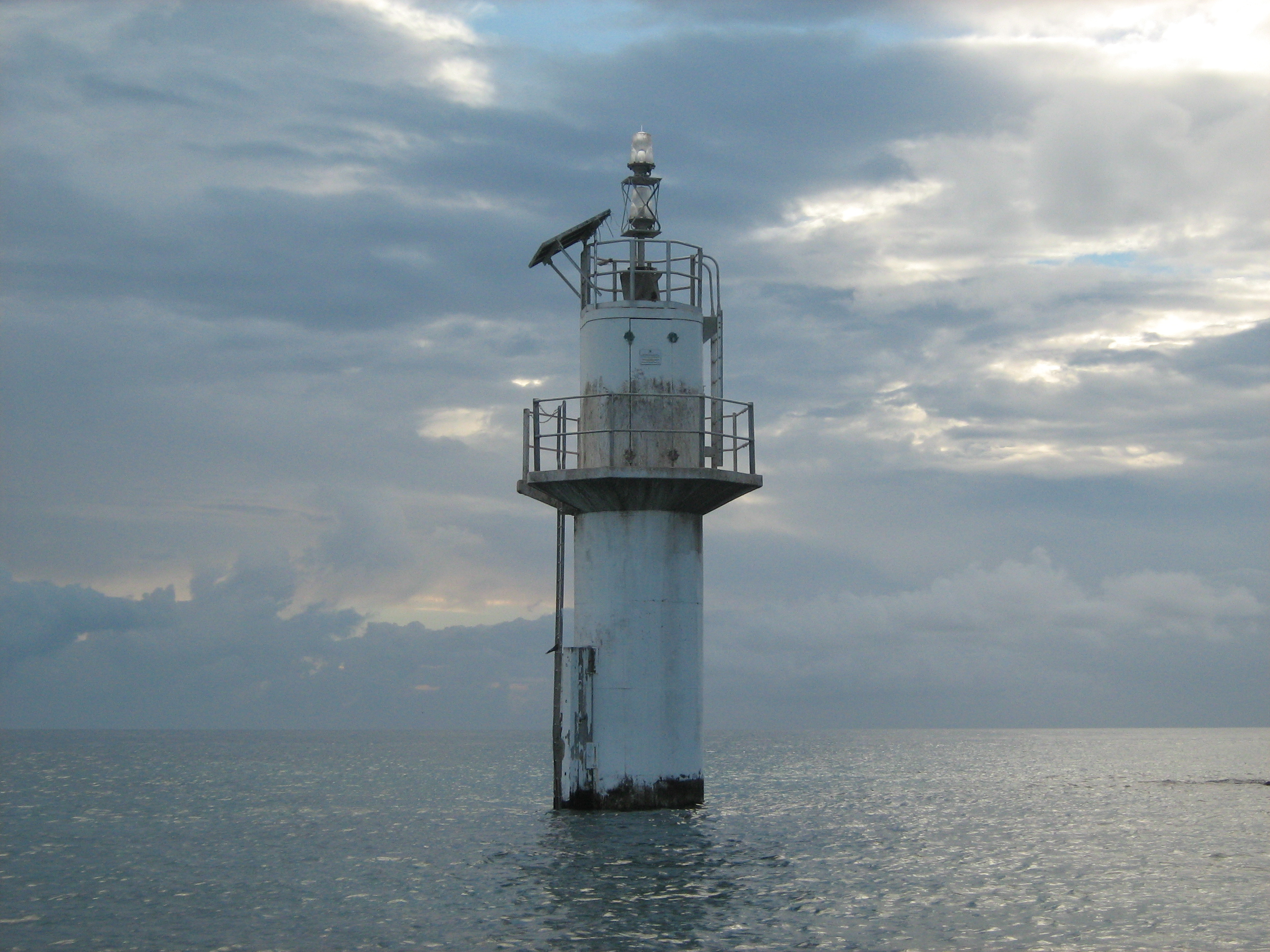 Bugatti Reef